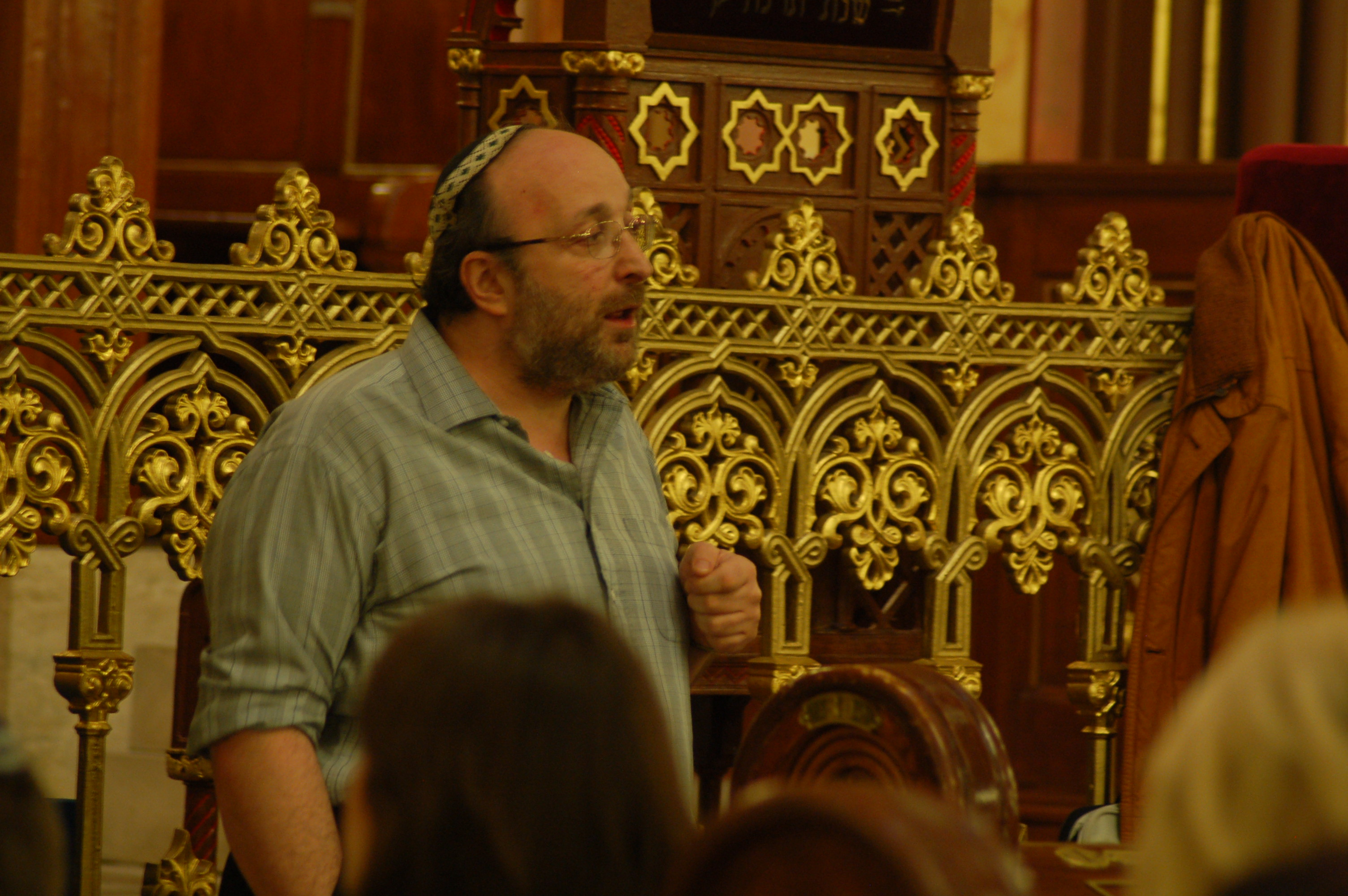 Frölich Róbert főrabbi